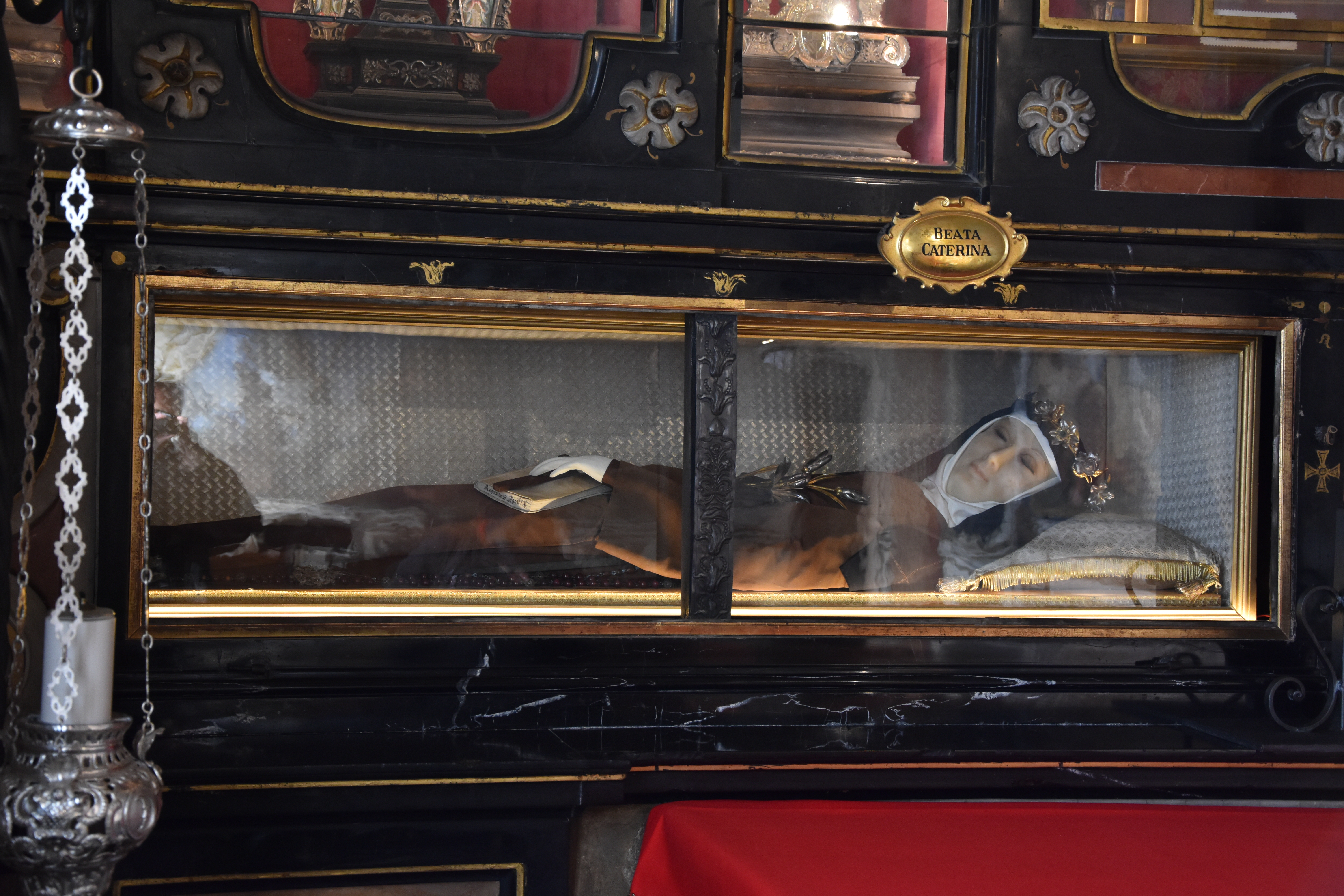 Interno del santuario di Santa Maria del Monte, nel comune di Varese.